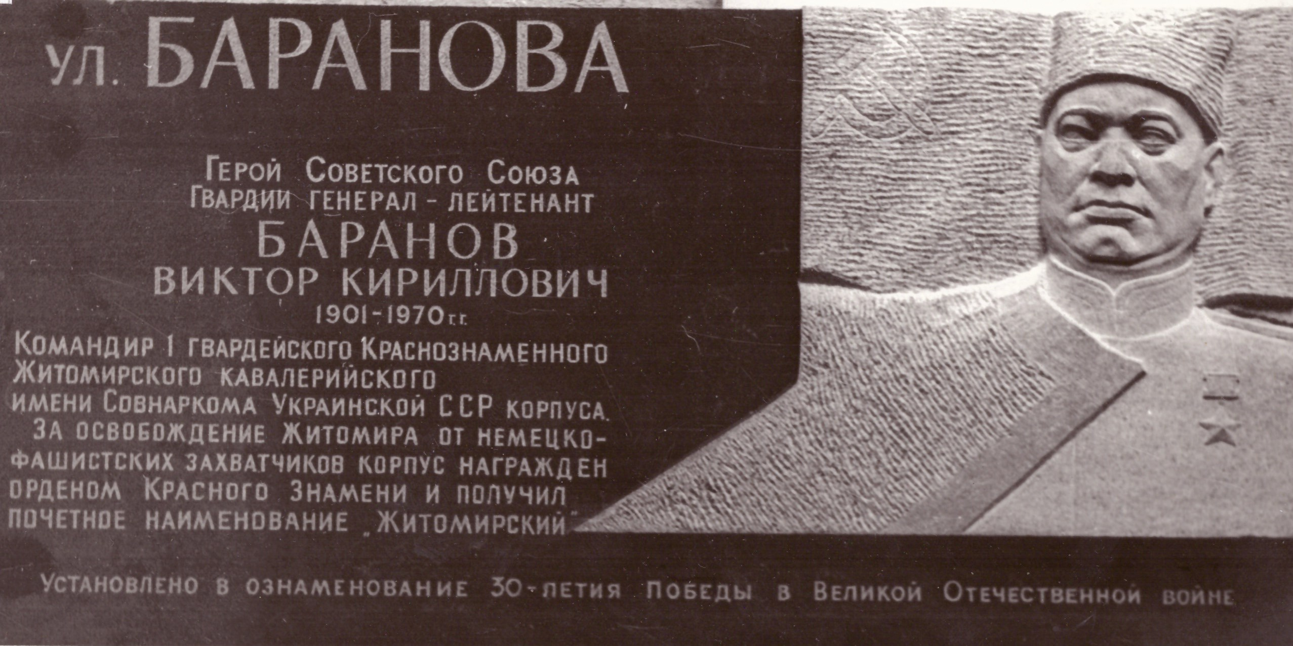 Герой Радянського Союзу генерал-лейтенант Баранов В.К. М. Житомир Житомирська область. 1975. Скульптор Таранченко В.О. Меморіальна дошка. Граніт. 150 х 66 х 15.